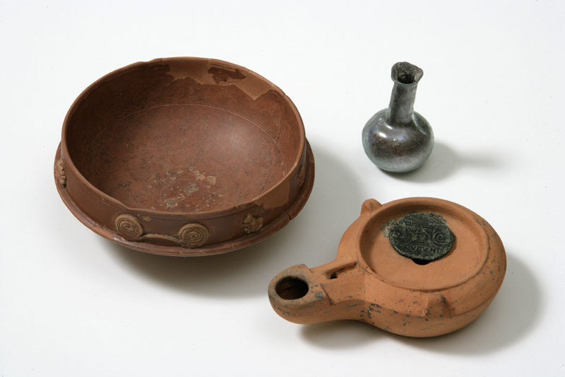 Corredo di sepoltura ad incinerazione: una lucerna del tipo Firmalampe con bollo FORTIS sul fondo, oggetto altamente simbolico, per illuminare il cammino nelle tenebre dell'aldilà. Un asse in bronzo dell'imperatore Tiberio, con obolo per pagare il traghettarore degli inferi Caronte. Un balsamario in vetro per contenere unguenti e una coppa in terra sigillata (tipo Drag. 24/25) probabilmente legata al rito della libagione.